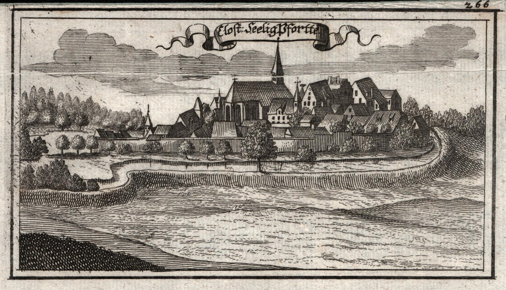 Das ehemalige Zisterzienserinnenkloster Seligenporten